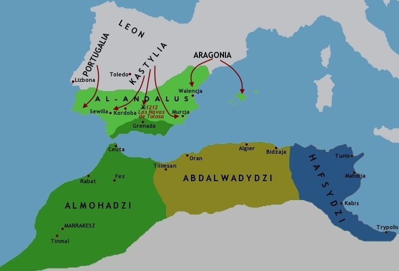 Imperium almohadzkie po 1212r.